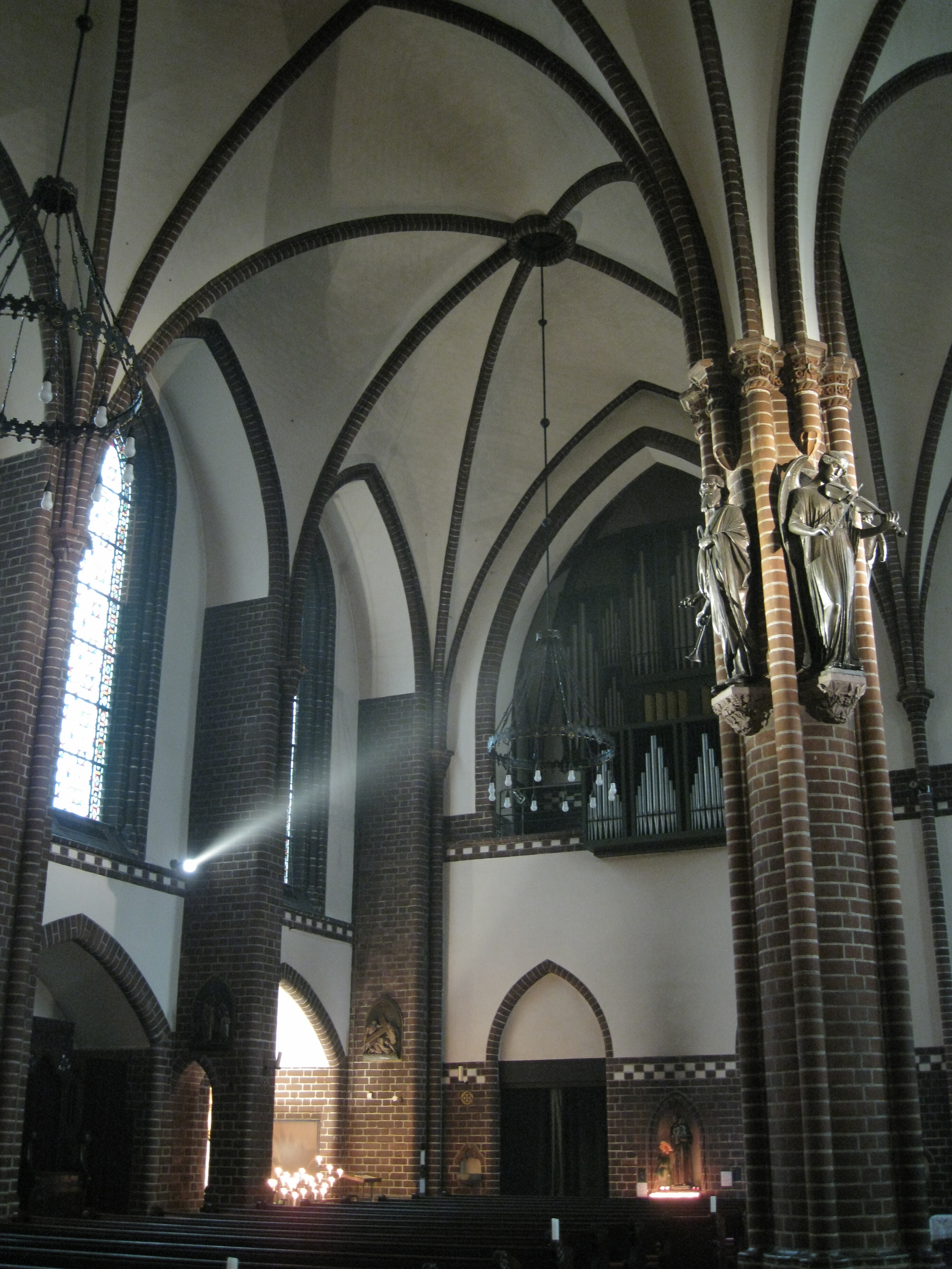 Blick auf Mittelsäule in Richtung Orgelempore